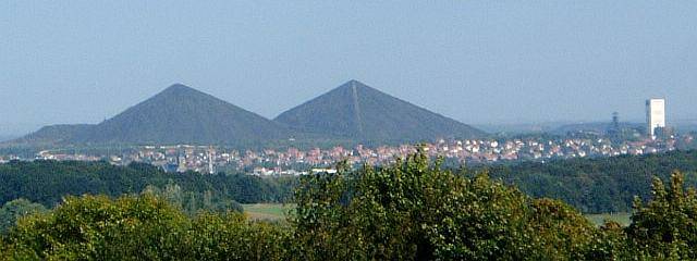 Terrils n° 74, 74A et 74B respectivement dénommés 11 - 19 de Lens Est, 11 - 19 de Lens Ouest et 11 - 19 de Lens Nouveau, fosse n° 11 - 19 de la Compagnie des mines de Lens, Loos-en-Gohelle, Pas-de-Calais, Nord-Pas-de-Calais, France.